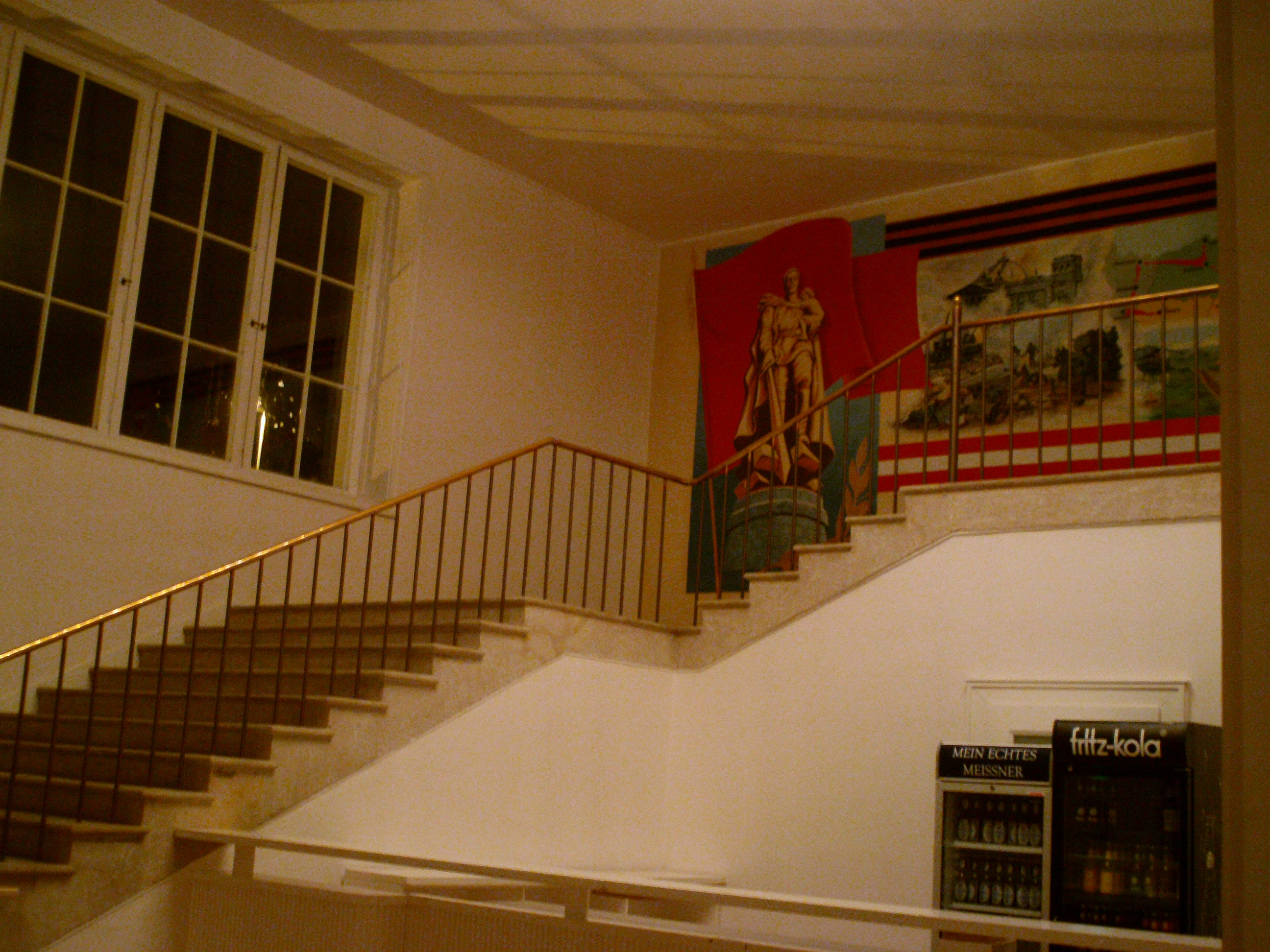 westliches Treppenhaus im Festspielhaus Hellerau; Wandbild von 1979